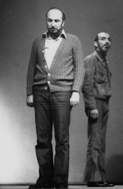 Fotografia di scena dello spettacolo "Giorni di lotta con Di Vittorio", andato in scena per la prima volta il 17 maggio 1972 in anteprima a Taranto e in prima nazionale il 18 maggio a Cerignola per l'edizione del Teatro Stabile di Bolzano, sotto la regia di Maurizio Scaparro, scenografo Roberto Francia. Testo originale pubblicato nella collana Documenti (Teatro Stabile di Bolzano/Testi) da Marsilio Editori, Padova 1972.